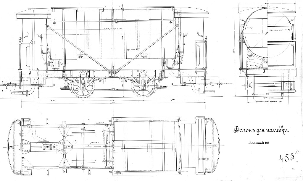 Схема трамвайного вагона-цистерны